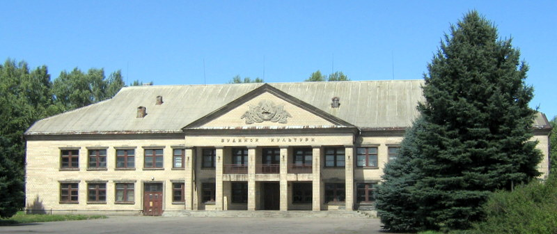 Будинок культури в Боровиці Чигиринського району